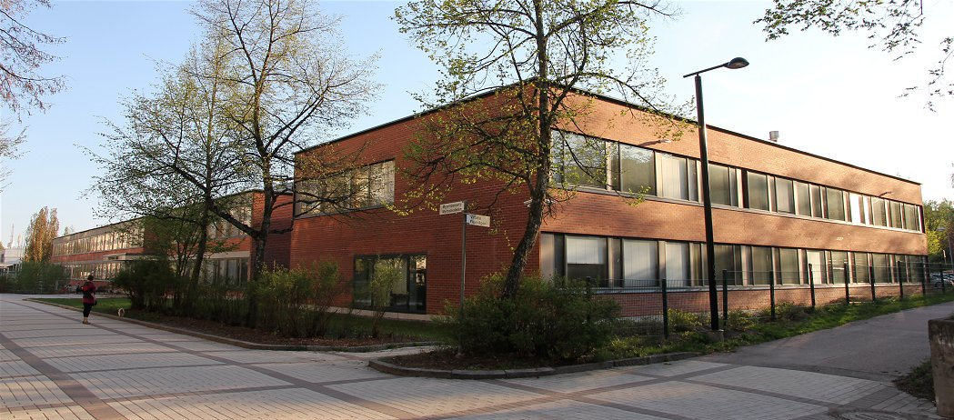 Vaskivuoren lukio (rakennettu 1977) Vantaan Myyrmäen kaupunginosassa. Huom: Kuvan käyttö edellyttää lisenssiehtojen mukaisesti viittausta kuvaajaan.